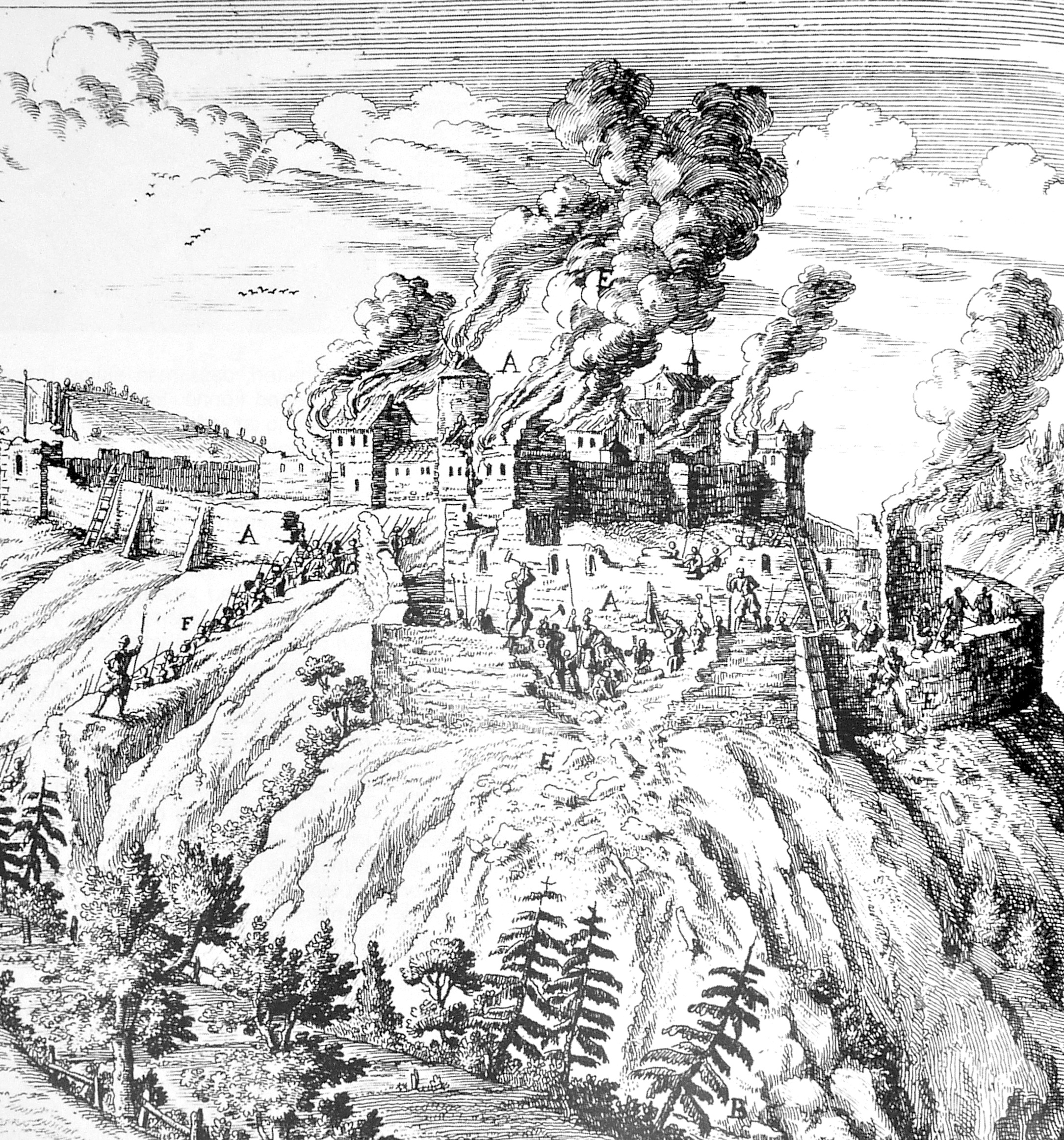 Die Zerstörung der Burg Wulp 1268. Romantisierende Zeichnung von Johann Melchior Füssli (1677 - 1736)